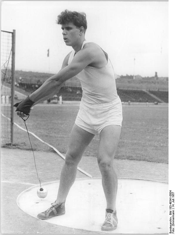 Eberhard Scott Zentralbild Zimmermann Zim-Ho 14.07.1957 3.Tag der Leichtathletikmeisterschaften 1957 im Walter-Ulbricht-Stadion, Berlin.UBz: Eberhard Scott vom SC Wissenschaft DHfK beim Hammerwerfen.